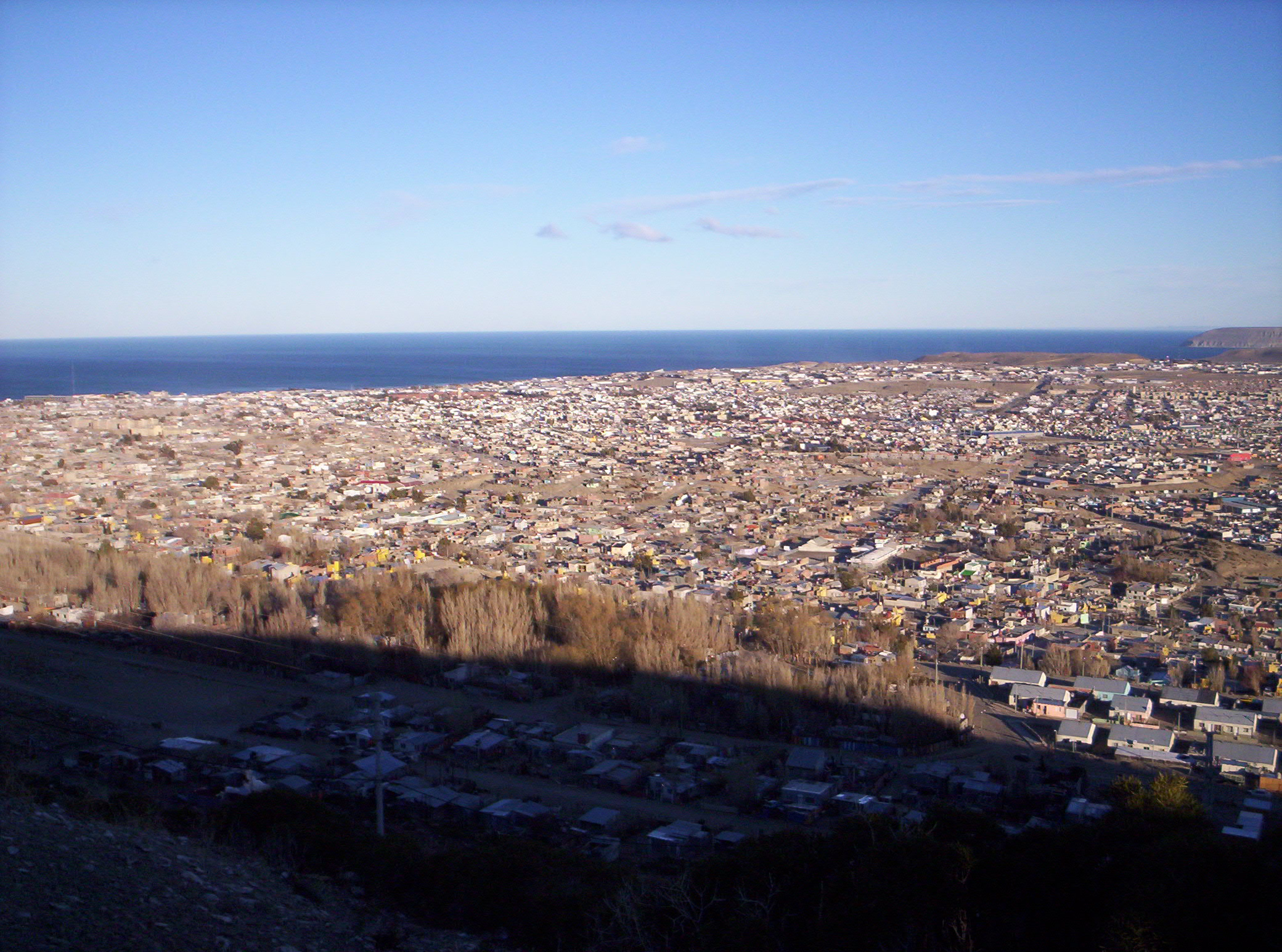 Comodoro Rivadavia-Rada Tilly